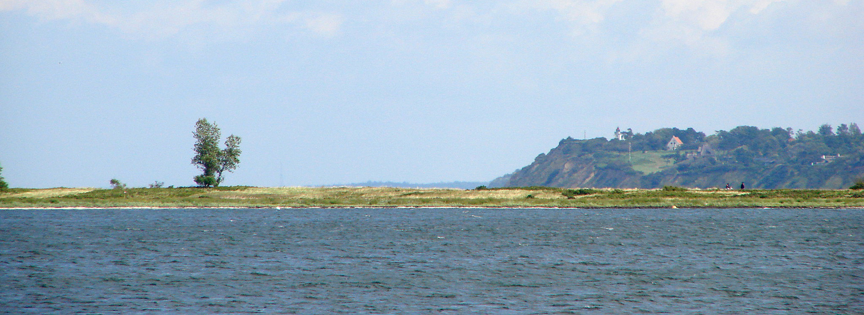 Skansehage ved Isefjorden med Spodsbjerg Fyr ved Hundested i Baggrunden.